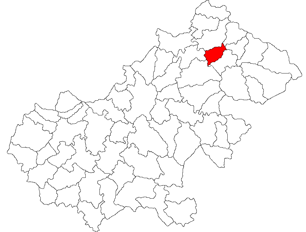 Categorie:Hărţi ale judeţului Satu Mare